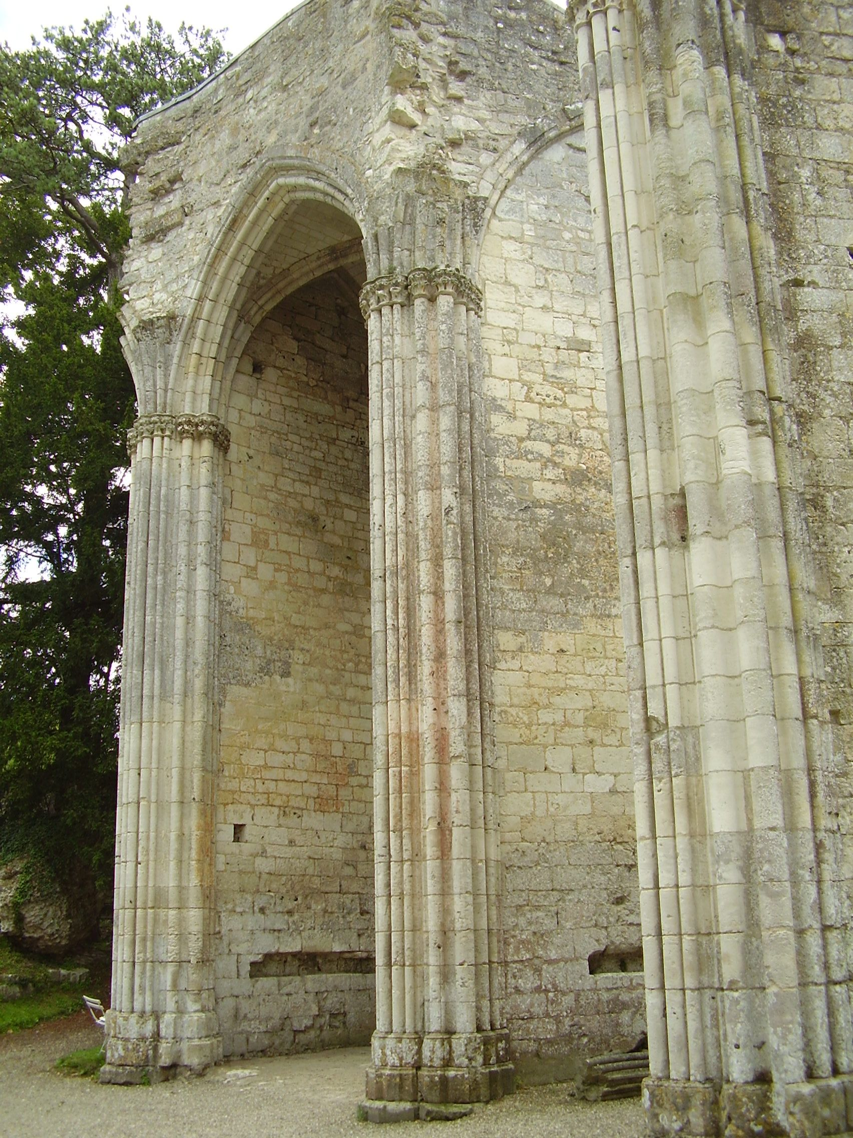 Abbaye de Jumièges, the most beautiful ruins in France